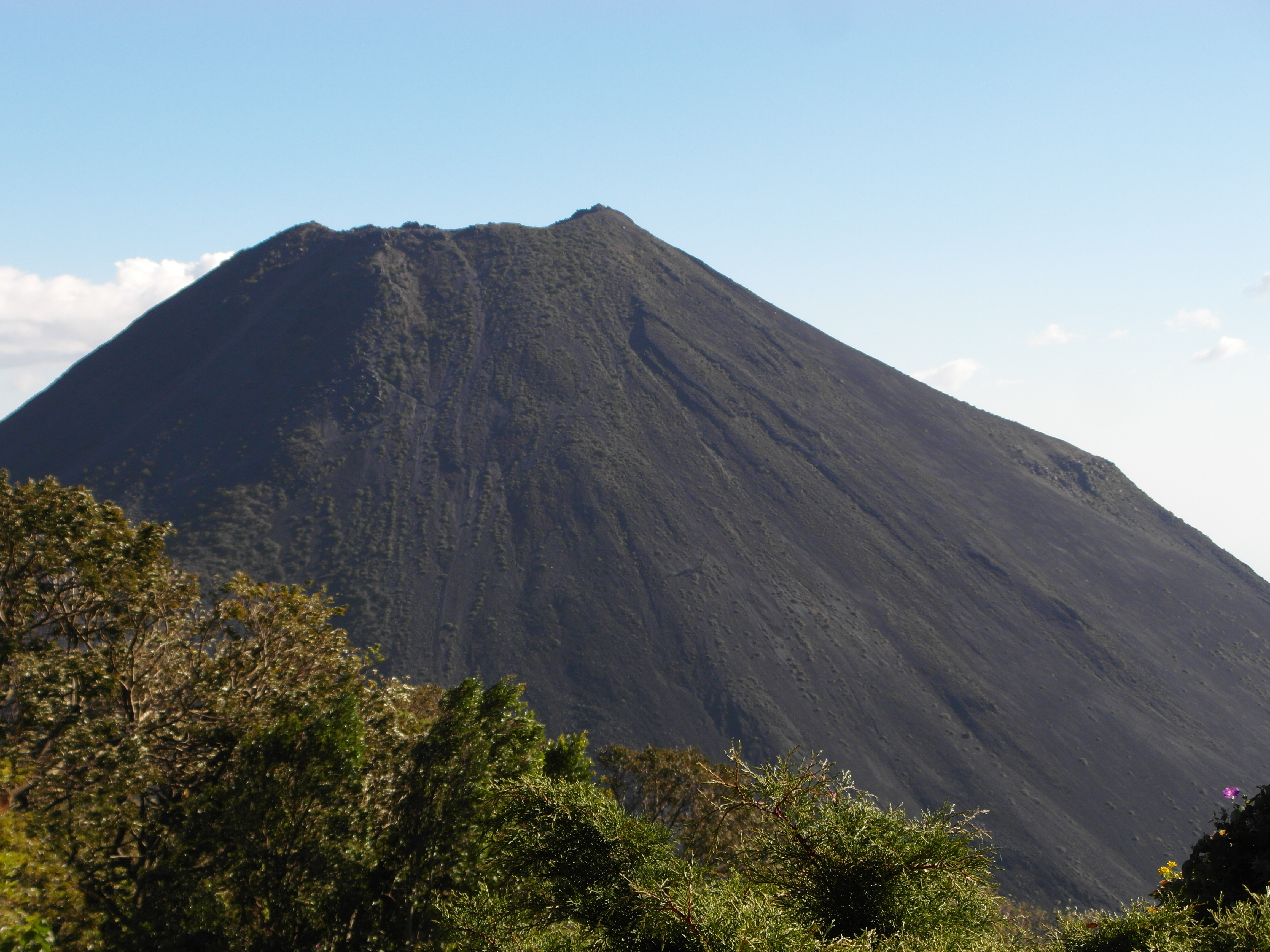 mas imágenes del izalco